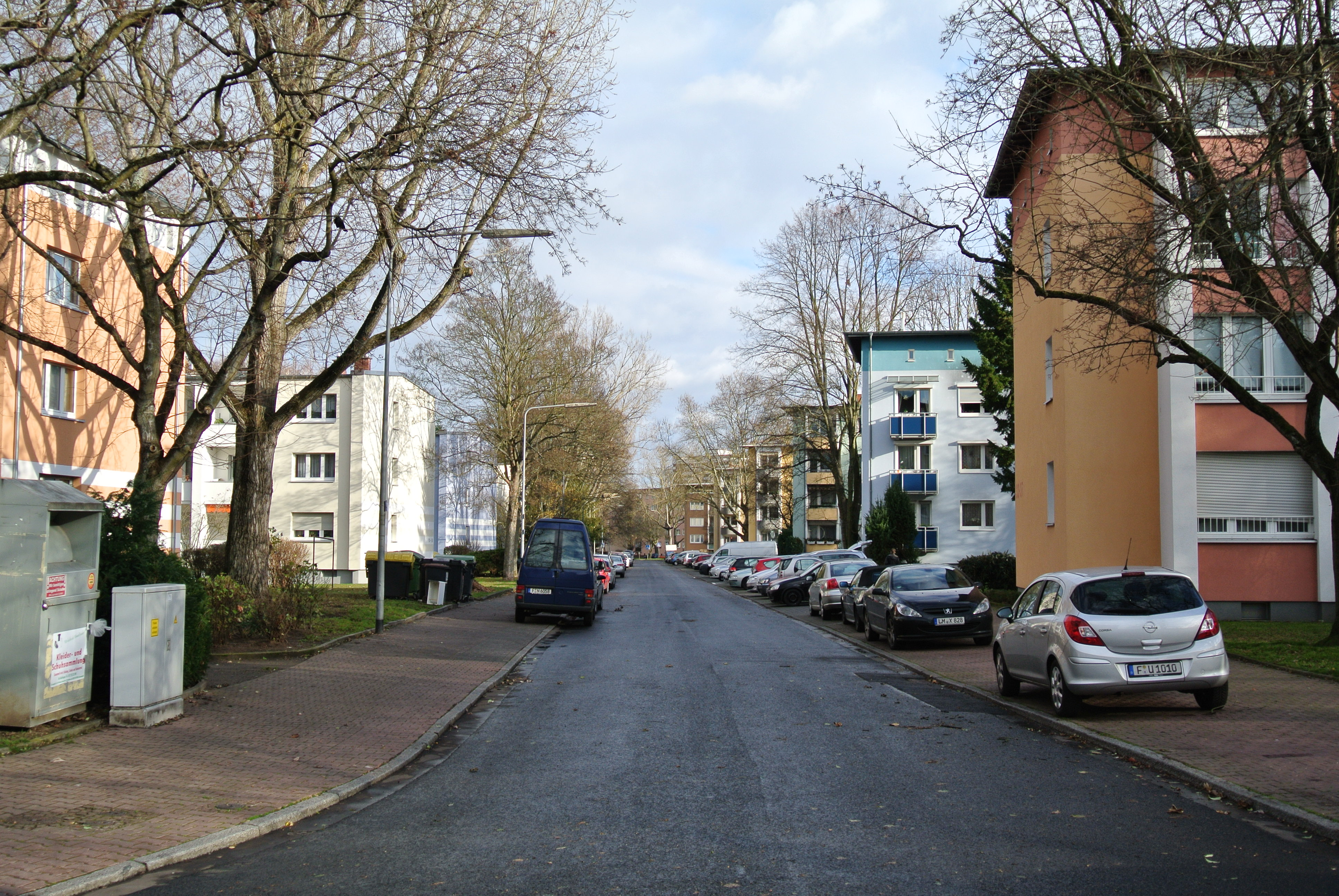 Fritz-Kissel-Siedlung in Frankfurt am Main, Sachsenhausen, Bauzeit: 1950-1955, Blick in die Breslauer Straße